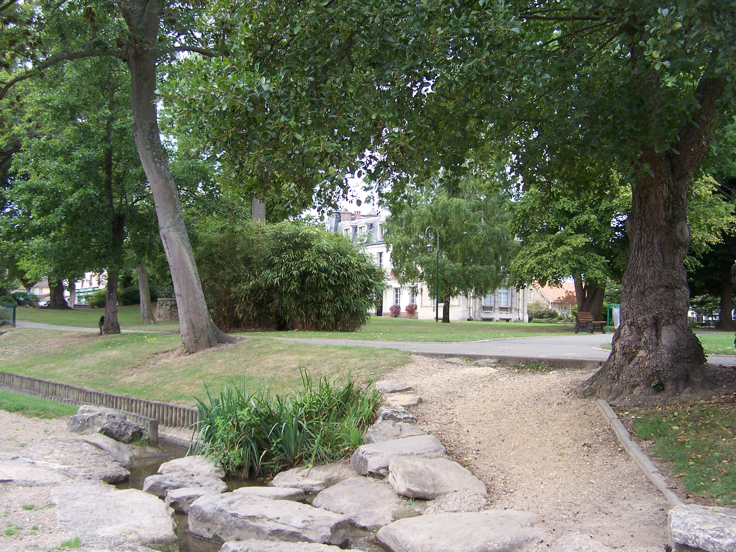 Parc de l'hôtel de ville à Plaisir (Yvelines, France)